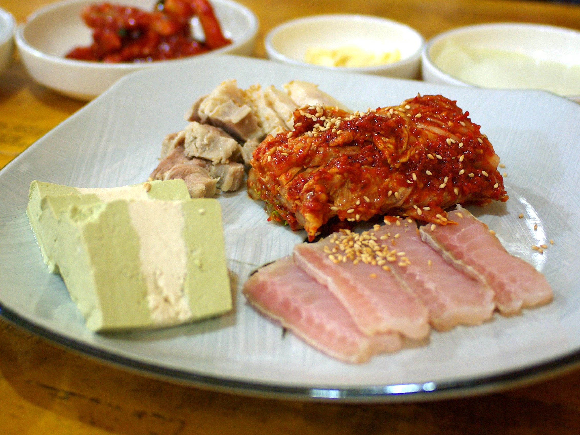 삼합홍합 + 두부 + 김치